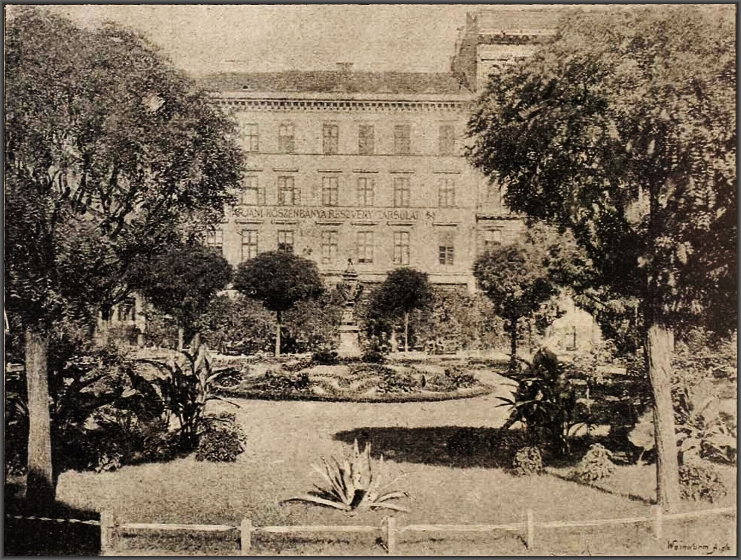 Modern virágágyak Budapest fő- és székváros sétaterein. Ilsemann Keresztély főkertésztől. Kertészeti lapok 1892. november, 11. szám, 292. p.